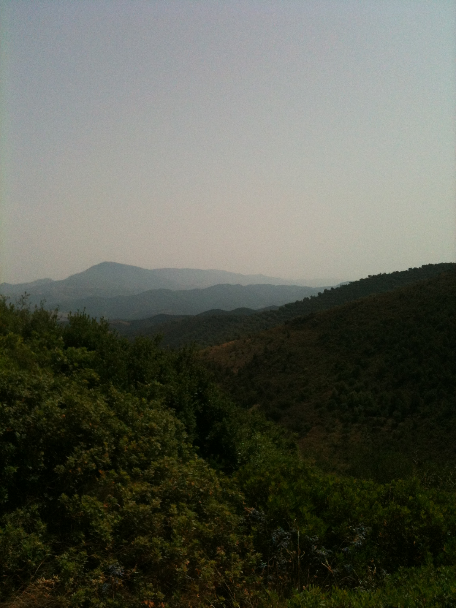 paysage montagneux recouvert de forêts